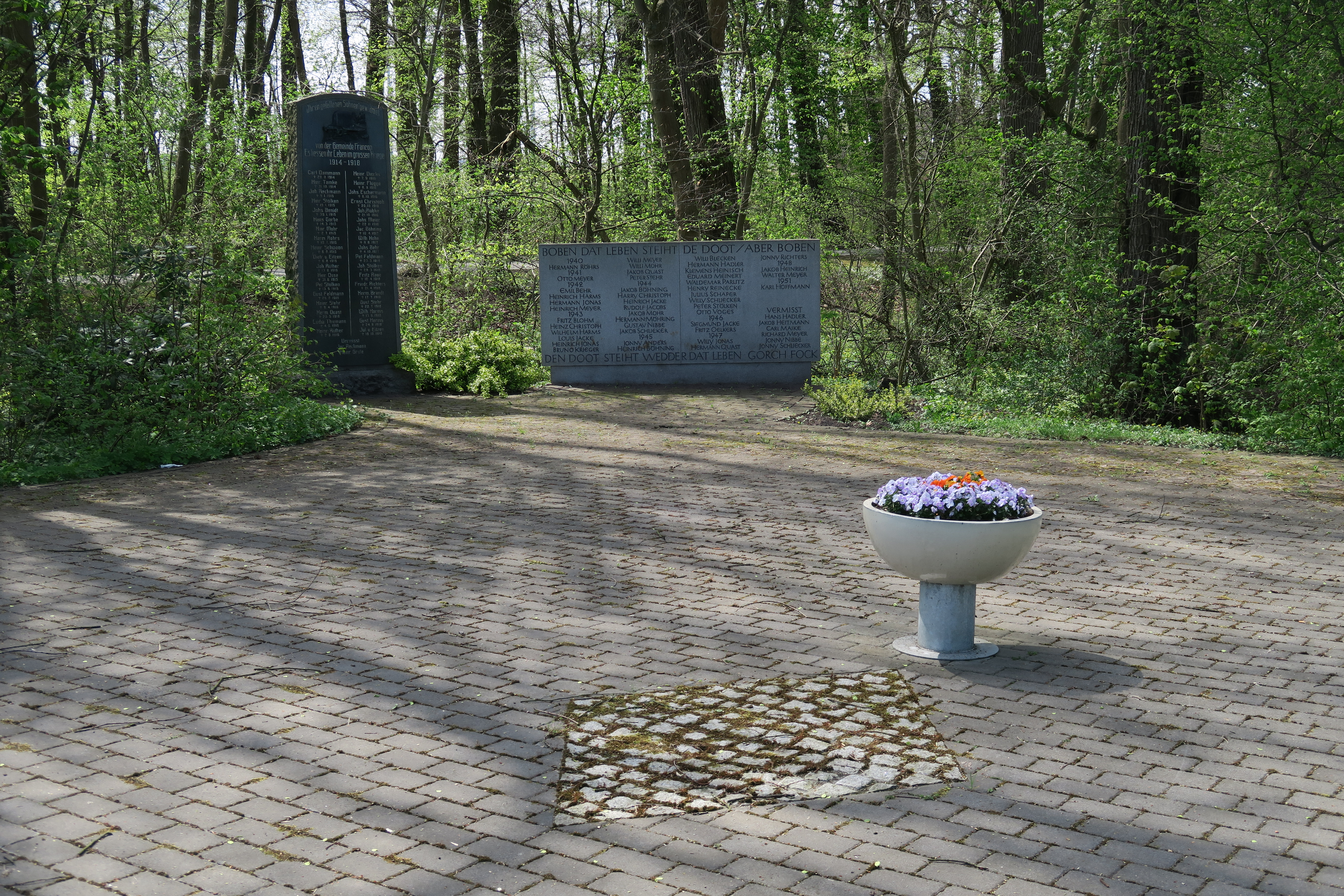 Kriegerdenkmal am Gutsbrack in Hamburg-Francop